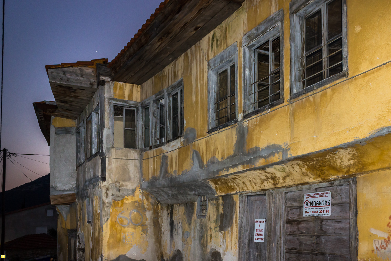 Μεσορόπη (παραδοσιακός οικισμός)«Μεσορόπη Καβάλας»